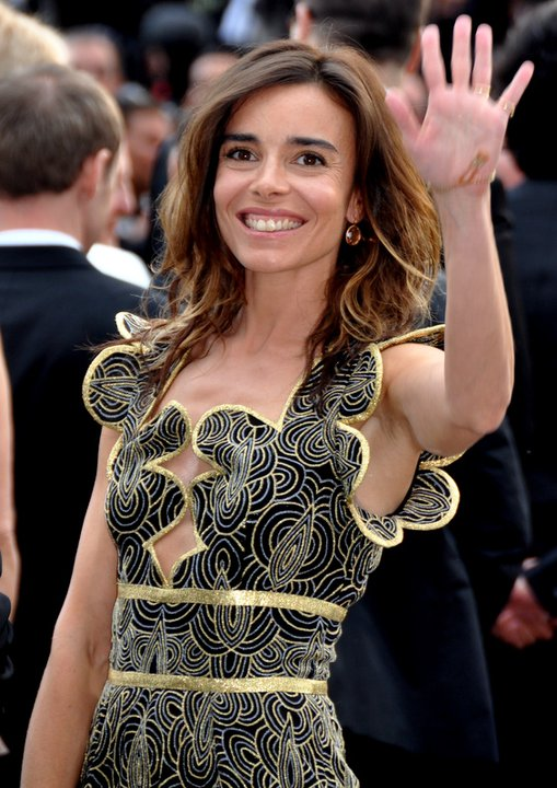 Elodie Bouchez au festival de Cannes